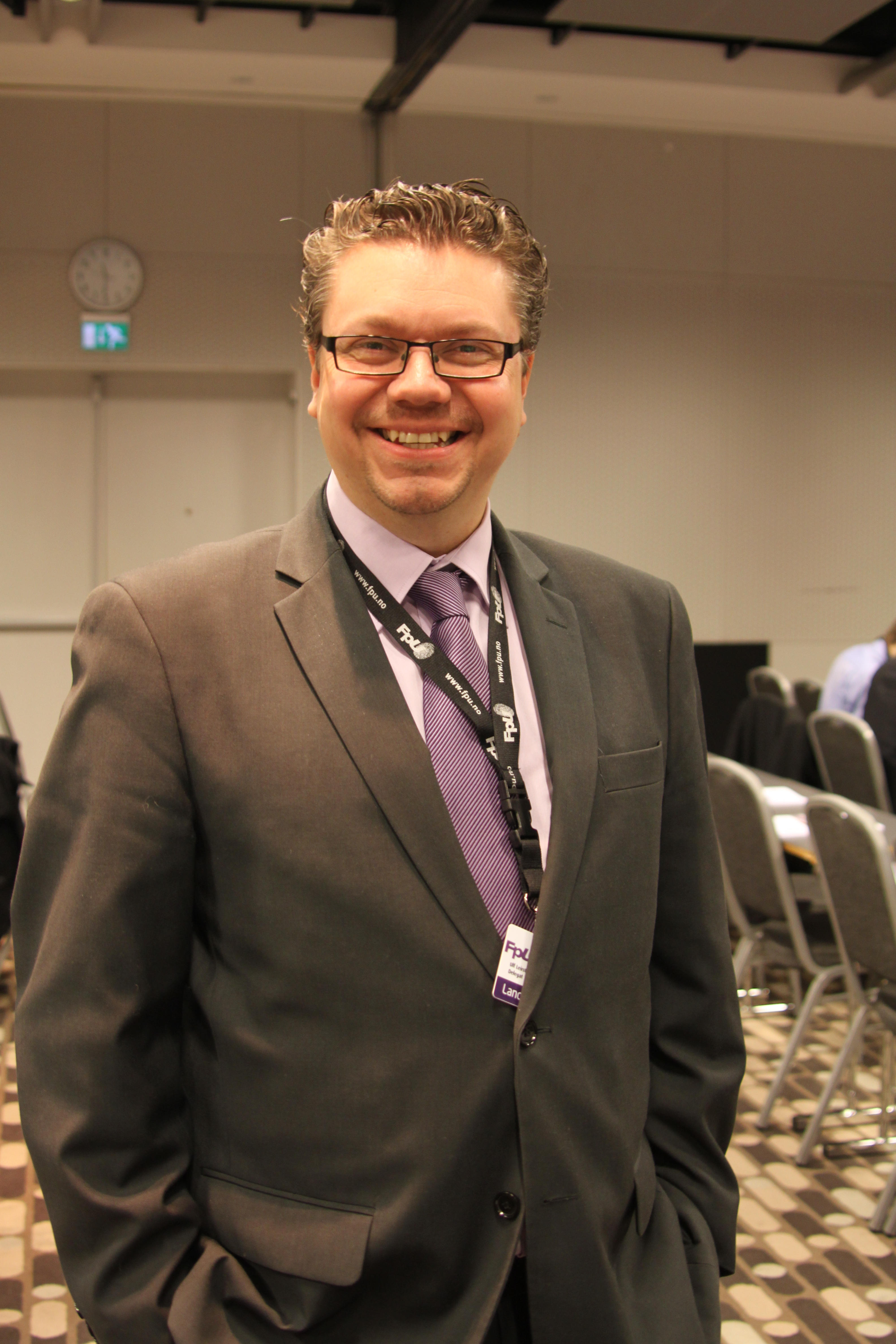 Ulf Leirstein på FpUs landsmøte 2012